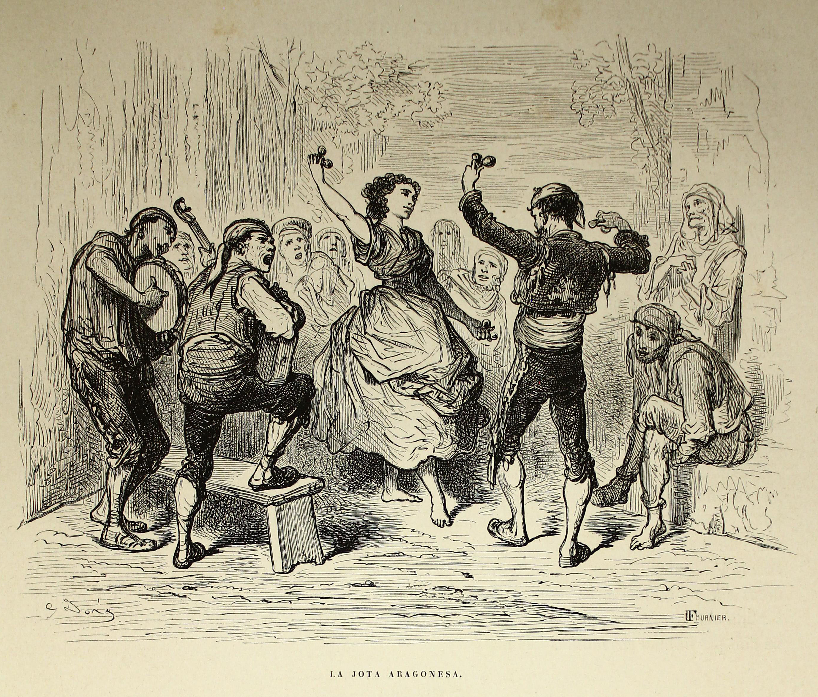 Autor: Davillier, Jean Charles, barón, 1823-1883 Descripción bibliográfica: L'Espagne / par Le Baron CH. Davillier ; ilustrée de 309 gravures dessinées su bois par Gustave Doré. - Paris : Librairie Hachette, 1874. - 799 p. : il. Materia: España- Geografía Materia: España- Usos y costumbres Ilustrador: Doré, Gustave, 1832-1883 Editor: Libreria Hachette Lugar de impresión: Francia, París Localización: Libro completo